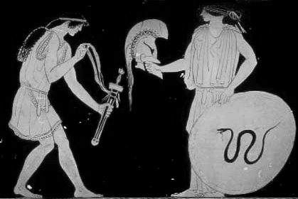 Η θέτις παραδίδει τον οπλισμό του Αχιλλέα. Λεπτομέρεια από ερυθρόμορφο αττικό αγγείο, περ 5ος αι.